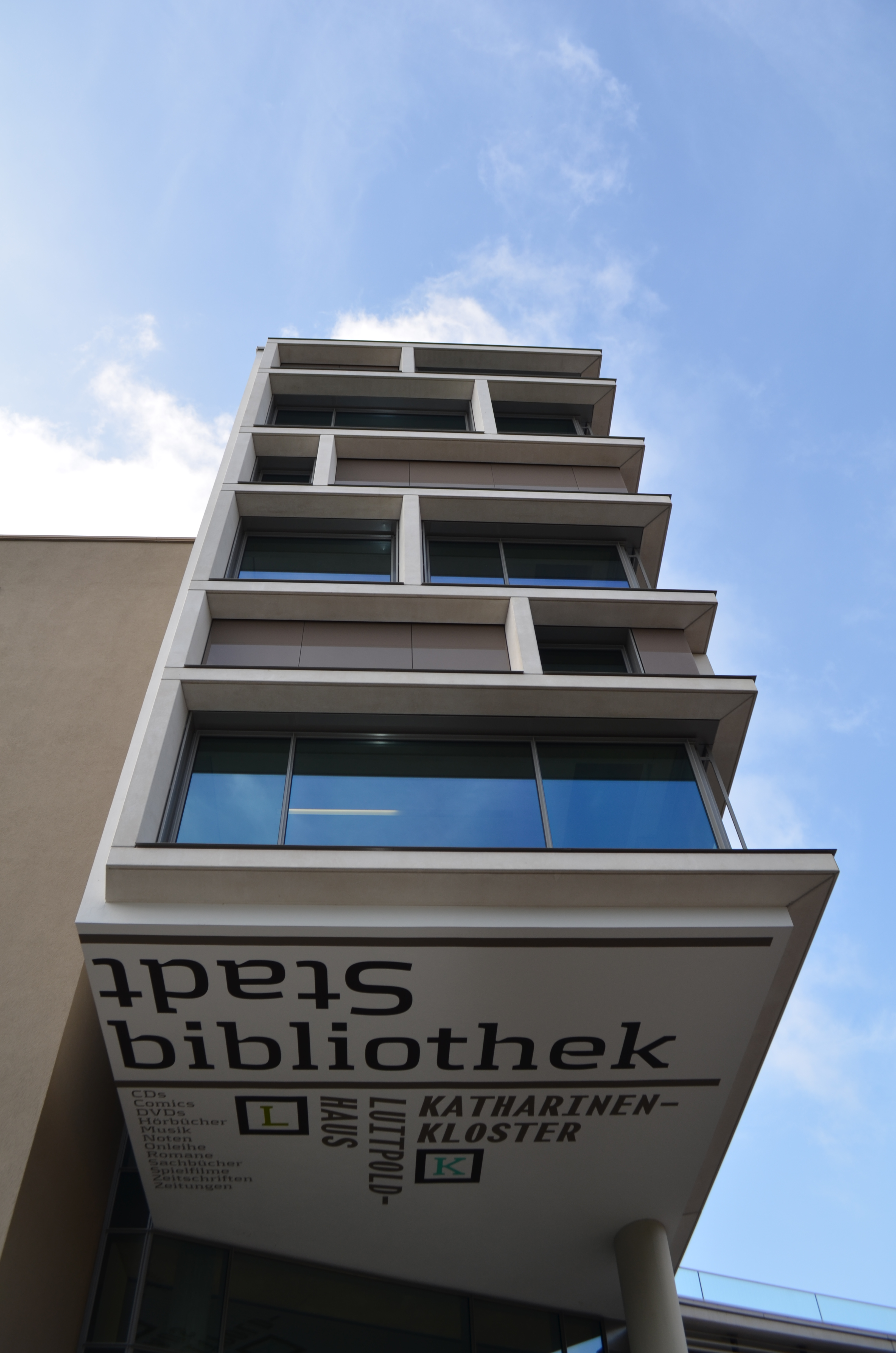 Stadtbibliothek Zentrum